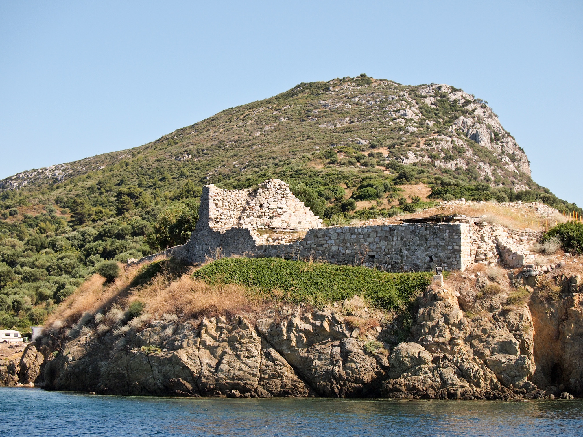 Αρχαία Τορώνη, κάστρο Λήκυθος